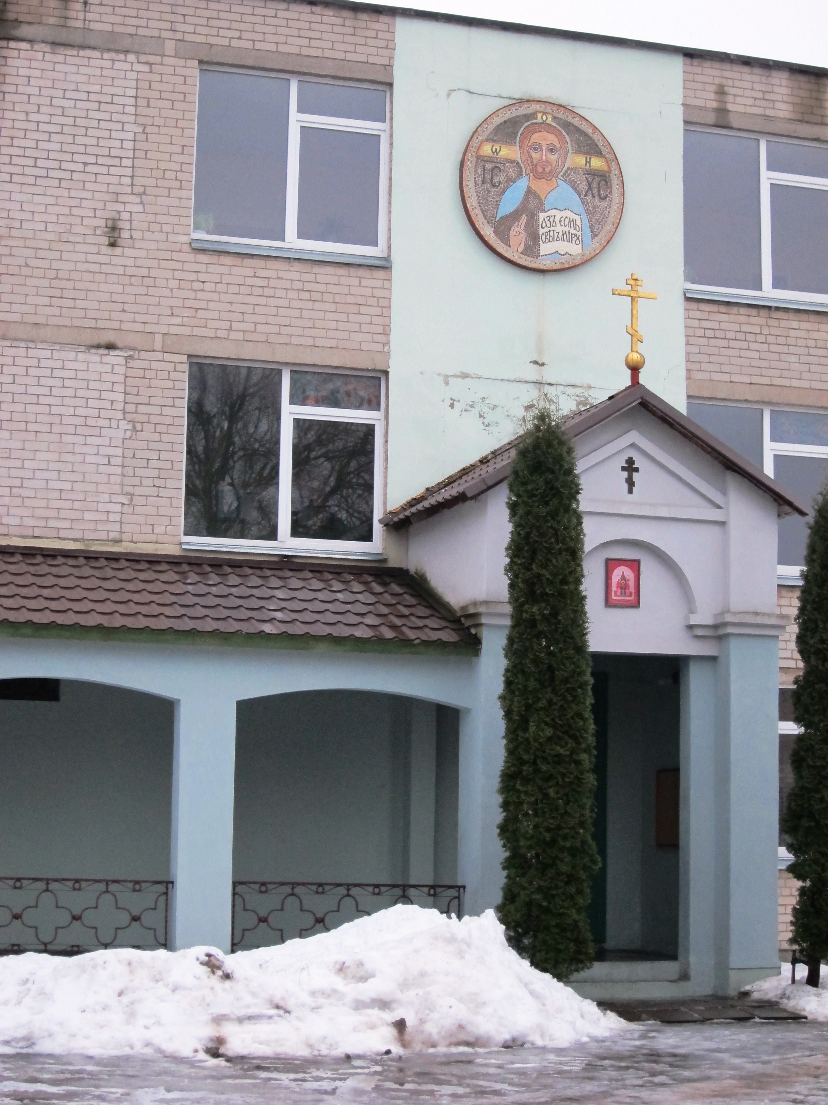 Klaipėdos Šv. kankinių Veros, Nadeždos ir Liubovės bei jų motinos Sofijos šventykla